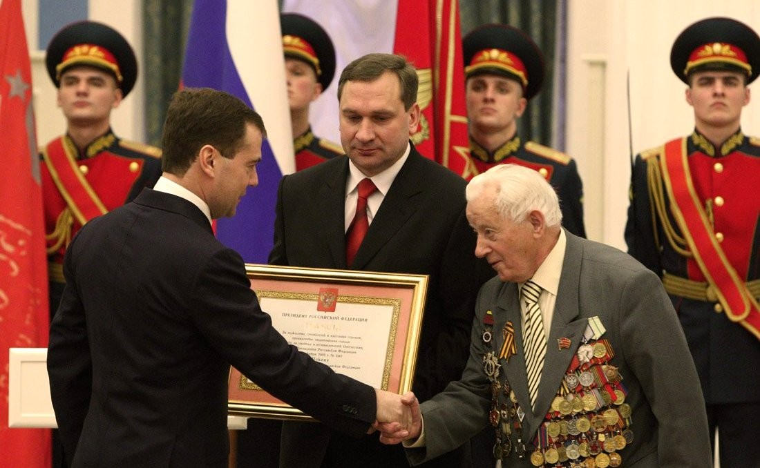 На церемонии вручения грамоты о присвоении звания «Город воинской славы» Пскову.